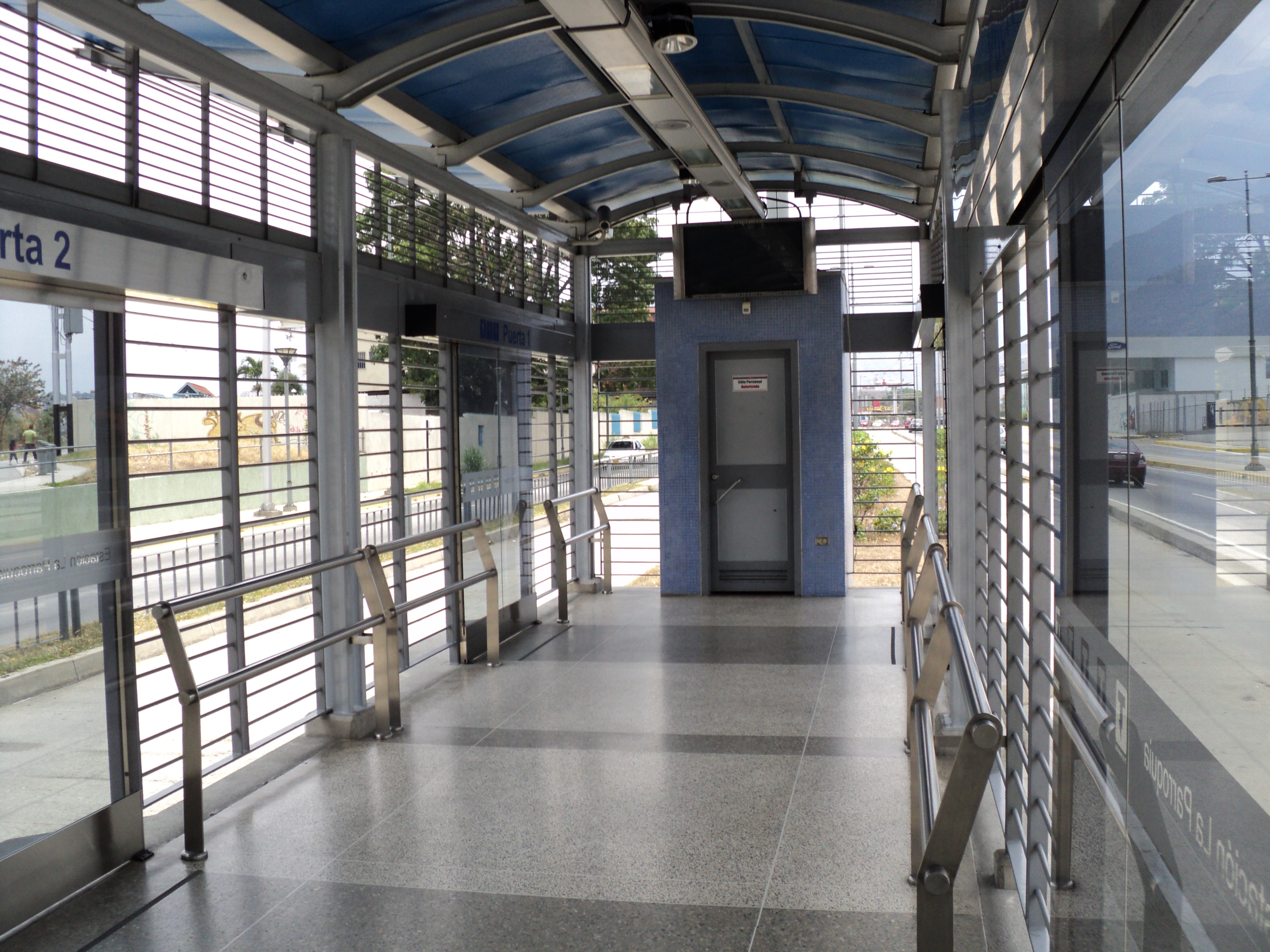 Interior de la estación Colegio de Abogados del Trolebús de Mérida, Venezuela